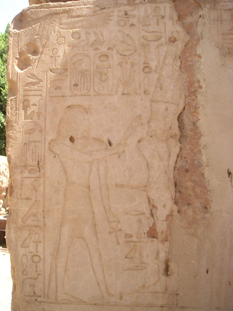 Chapelle de Thoutmosis IV représentant le roi offrant une laitue au dieu Amon-Min - Musée en plein air de Karnak - XVIIIe dynastie égyptienne